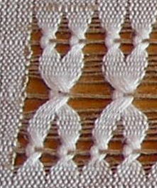 Detalj av karelsk spets. Detalj från här